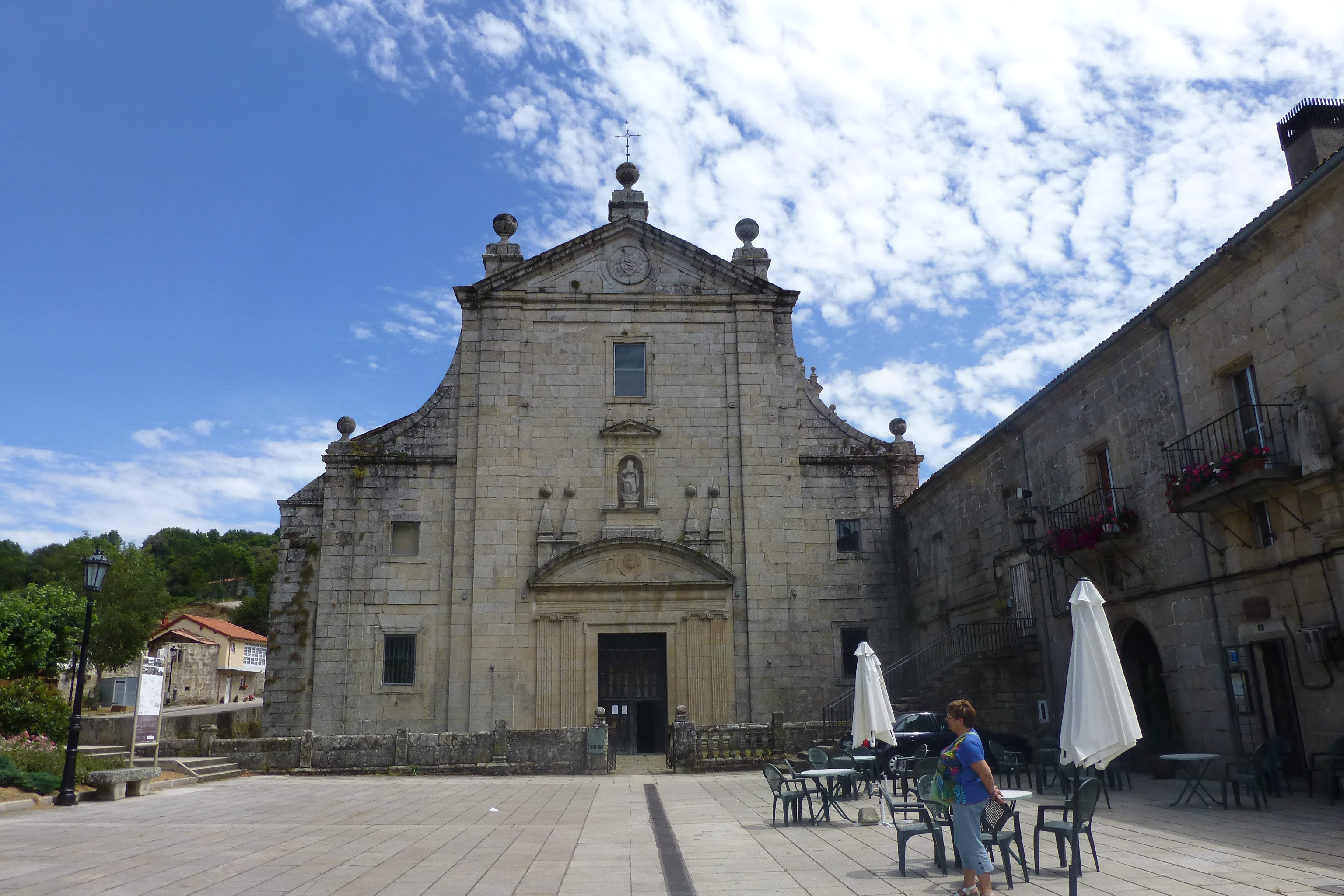 Monasterio de Santa Maria de Montederramo Ourense Galicia España.